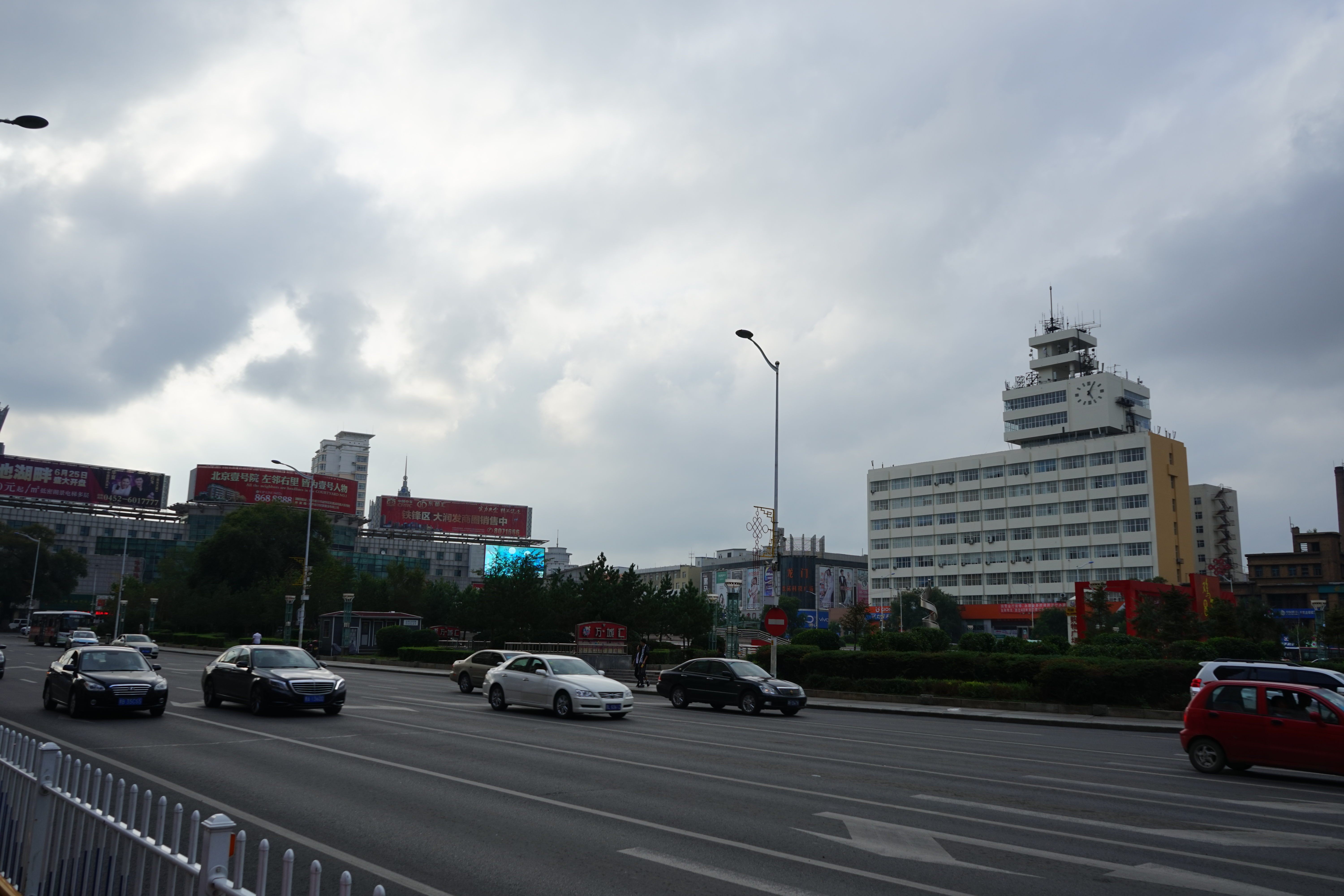 中环广场、电信大楼